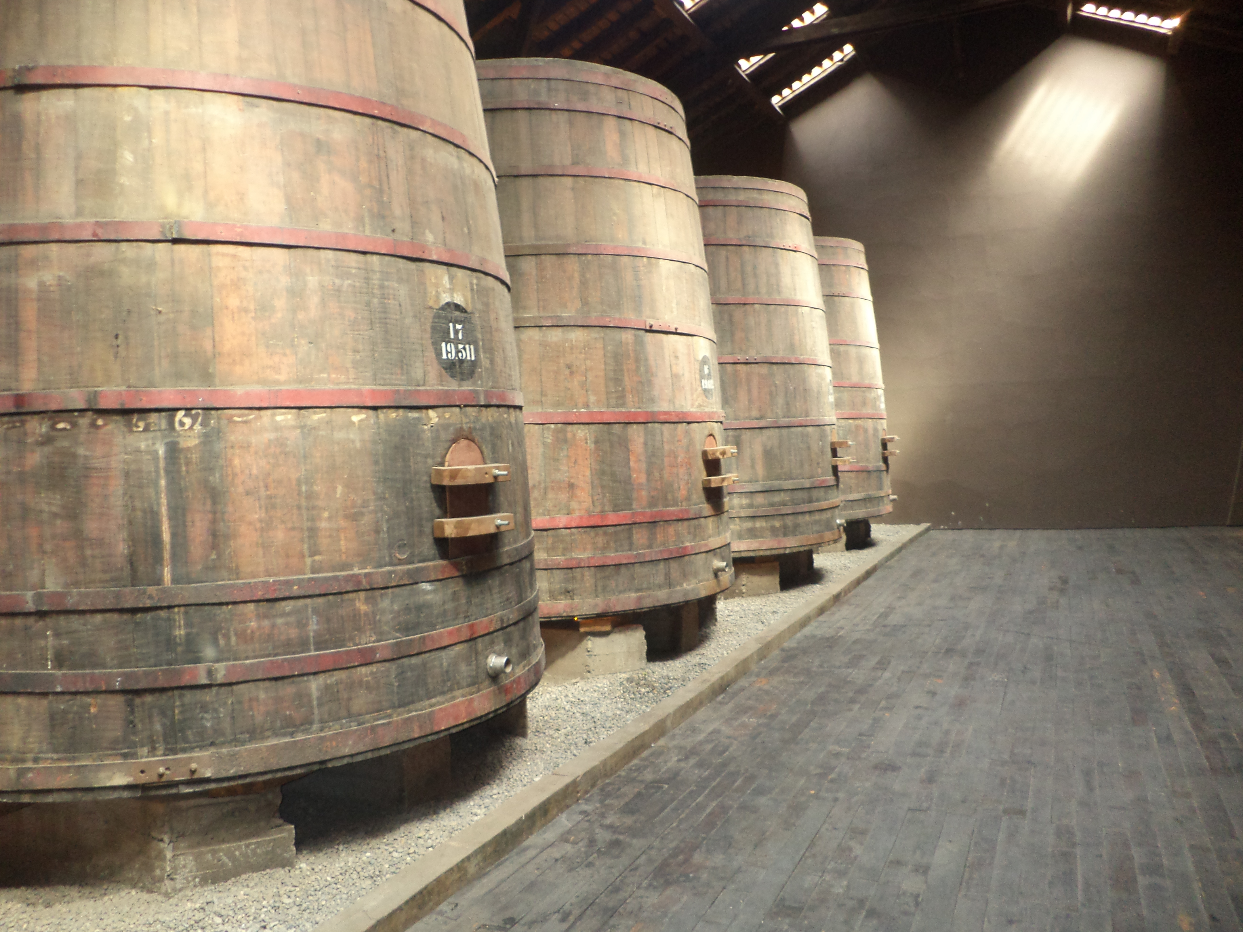 Casa del enólogo y bodegas de la viña Santa Carolina, en Santiago de Chile. Declaradas Monumento Histórico Nacional en 1973. This is a photo of a national monument in Chile: 1252